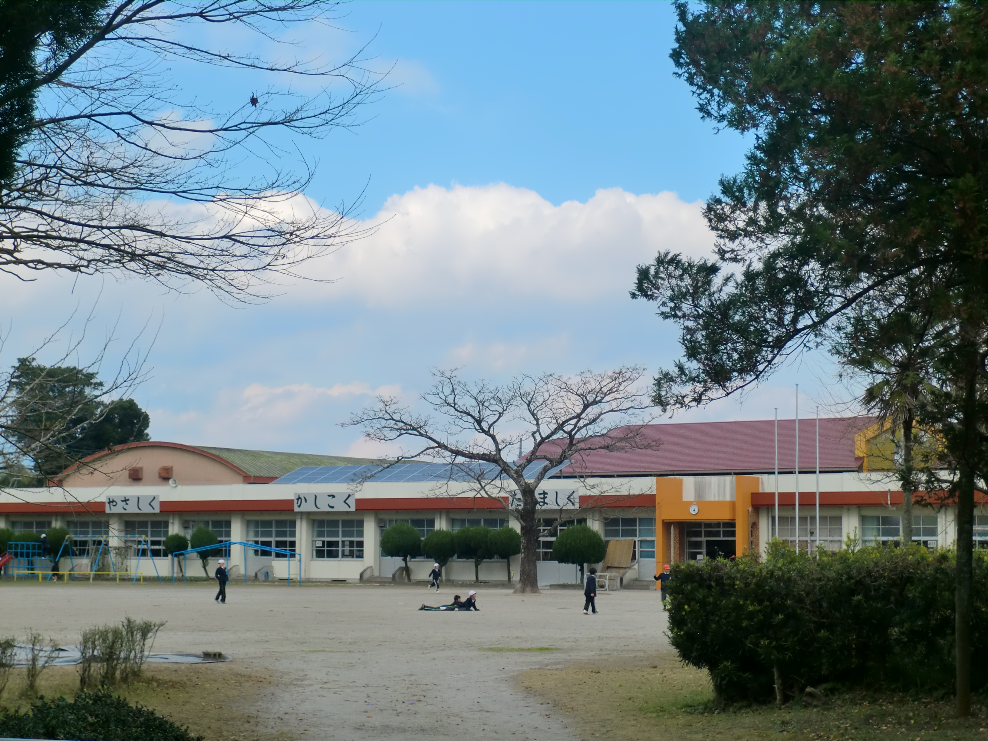 薩摩川内市にある薩摩川内市立副田（そえだ）小学校